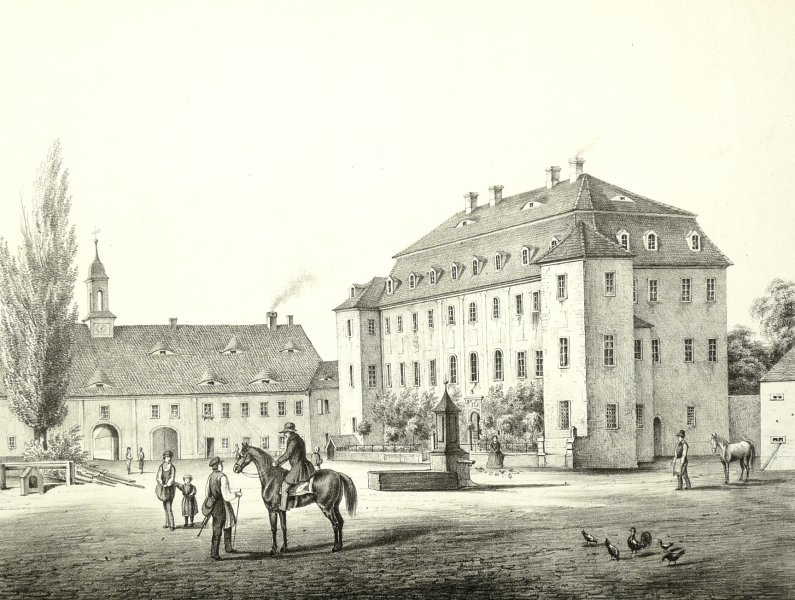 Schloss und Rittergut Grödel aus: Album der Schlösser und Rittergüter im Königreiche Sachsen .... Section II: Meissnischer Kreis (Leipzig: Expedition des Albums Sächsischer Rittergüter und Schlösser 1856). - Unterhalb betitelt. Druck bei L. Blau & Co. in Leipzig.